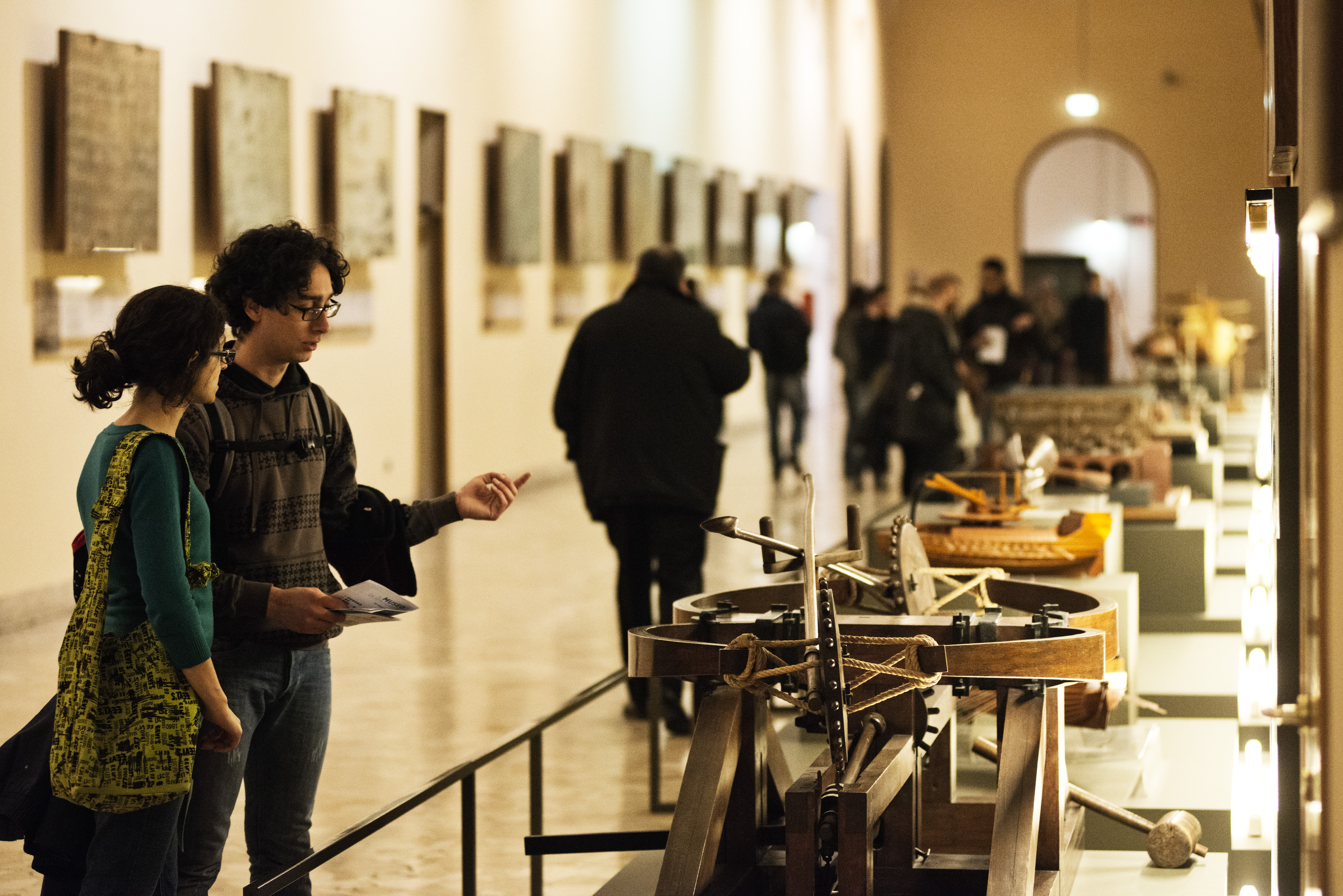 Galleria "Leonardo da Vinci" nel Museo nazionale della scienza e della tecnologia Leonardo da Vinci, Milano. Foto di Alessandro Grassani